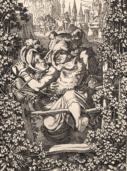 Illustration